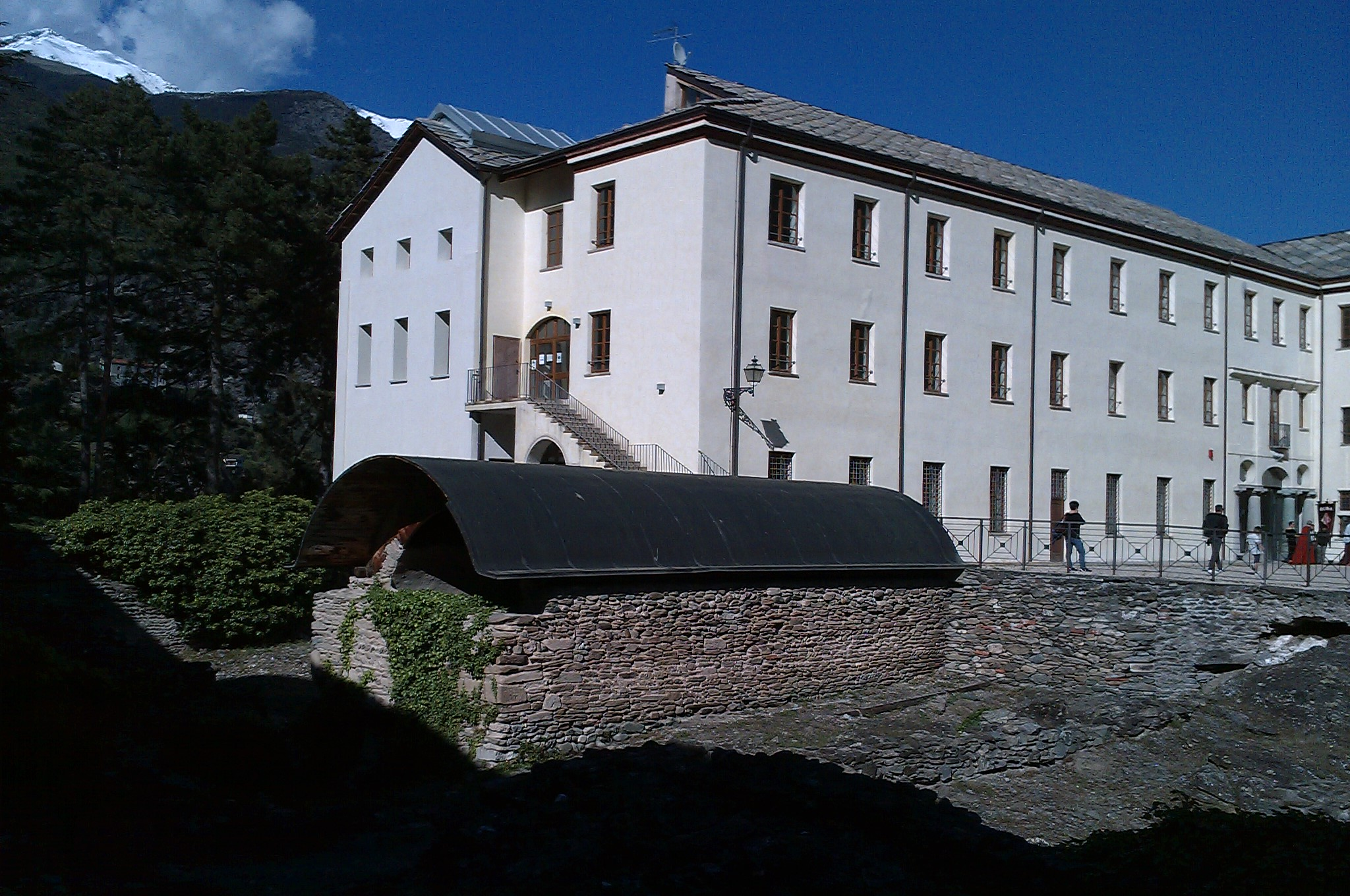 Susa, scavi romani del pretorium